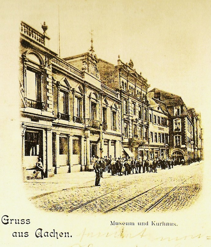 Scan einer alten Postkarte mit dem Motiv der "Alten Redoute Aachen" in der Komphausbadstraße 11